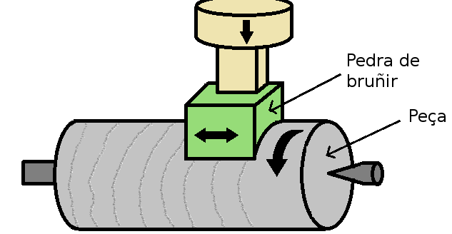 Esquema bruñido de exteriores.